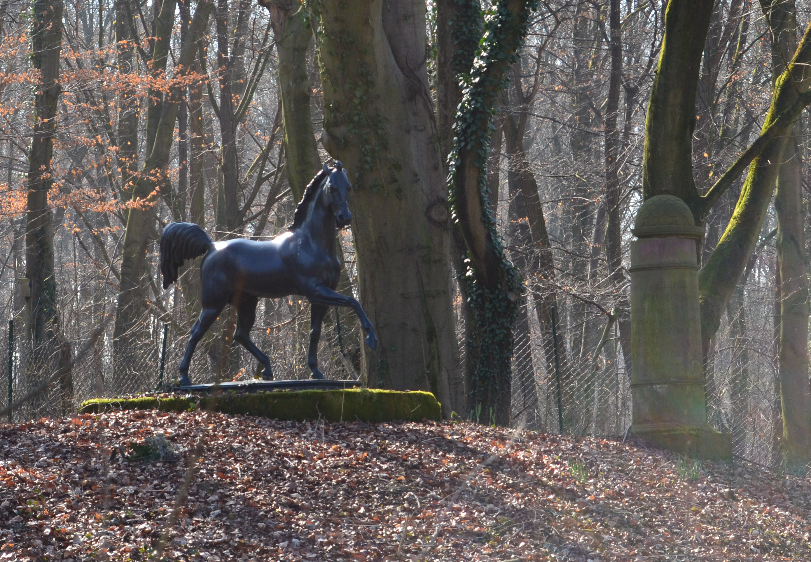 Frankfurt, Louisa-Park, Pferd und Säule